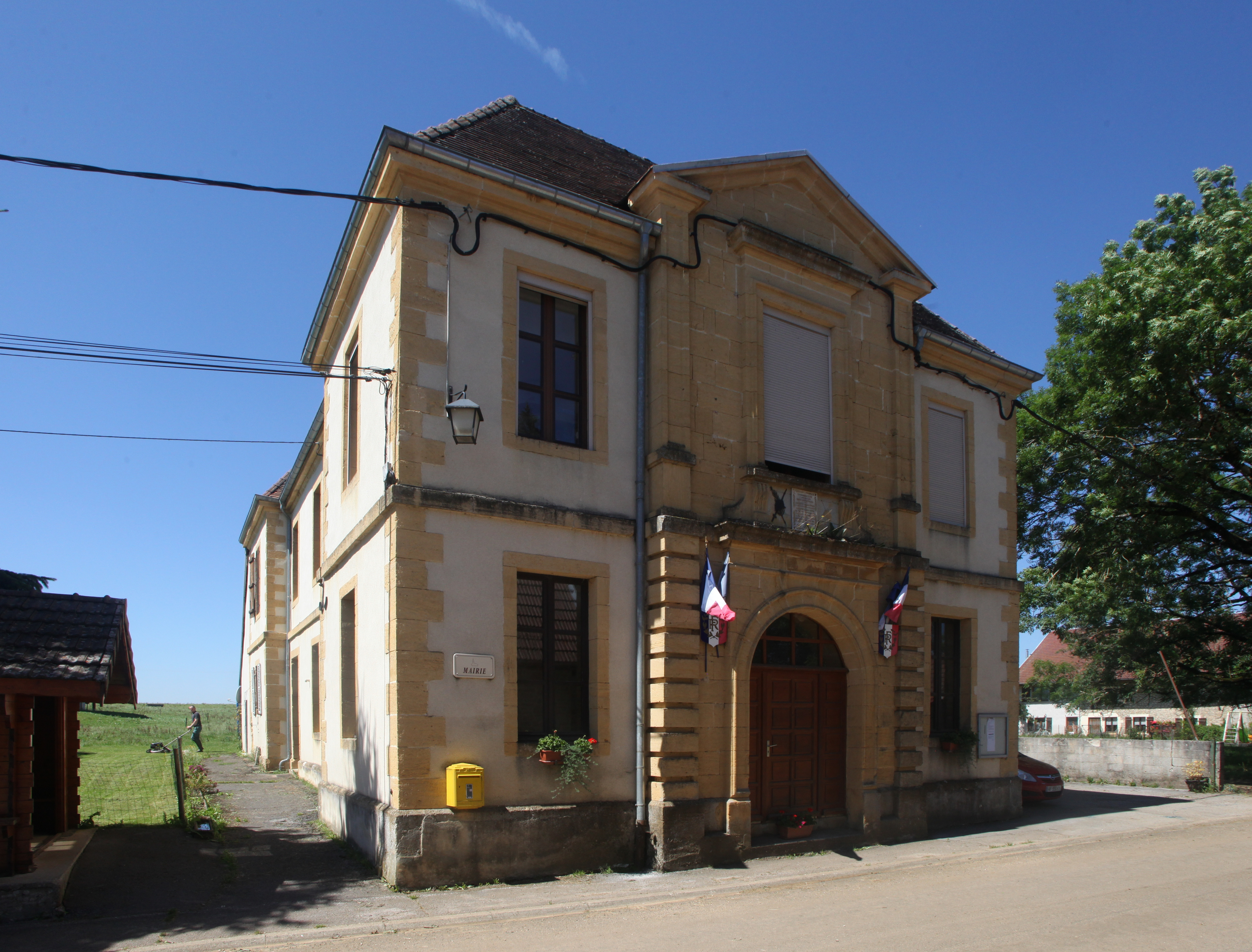 Mairie de Doye (Jura).